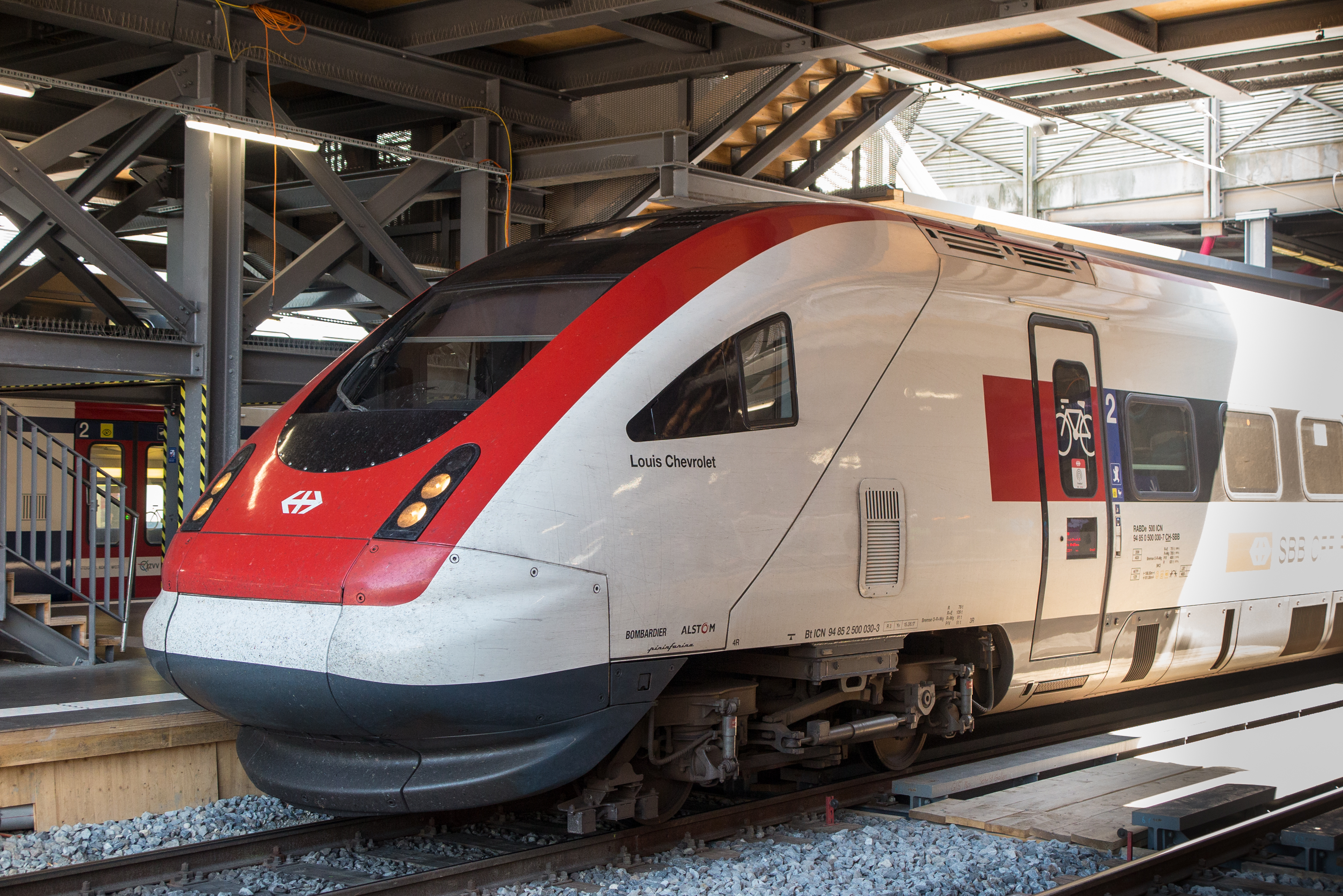 SBB Neigezug RABDe2 500 030 ICN "Louis" Chevrolet" im Bahnhof Winterthur